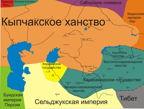 Караханиды в Средней Азии.